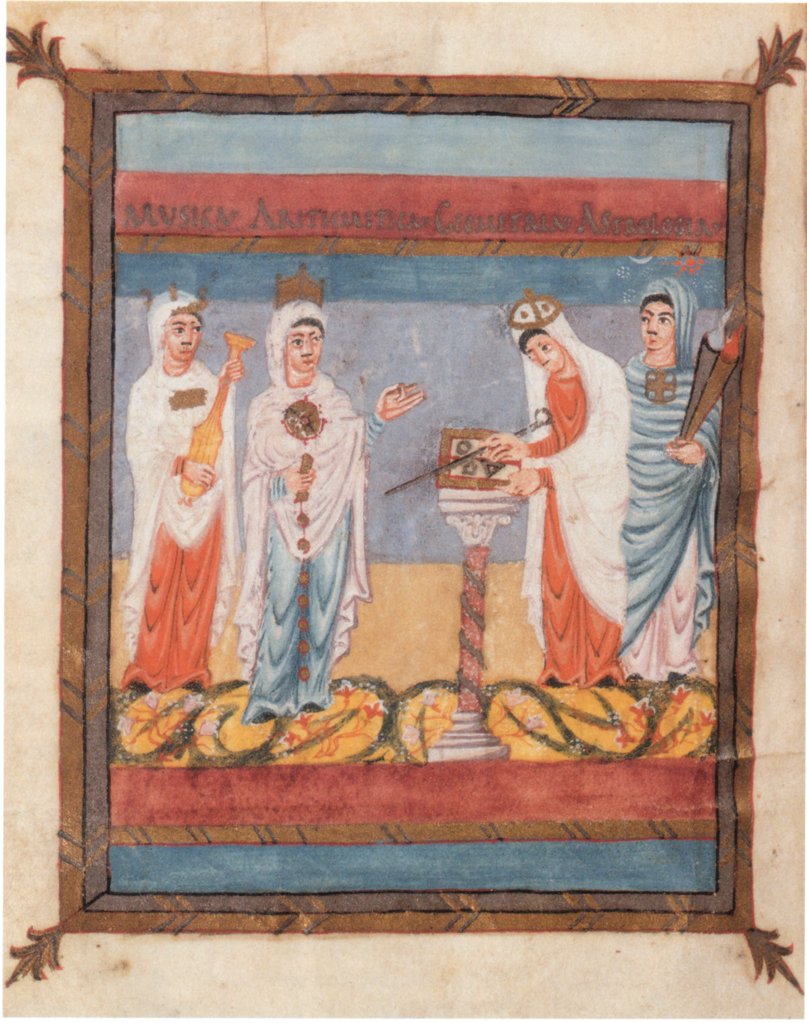 Bamberg, Msc.Class.5, fol. 9v Boethius: De institutione arithmetica (Tours, um 845) Die artes liberales des Quadriviums